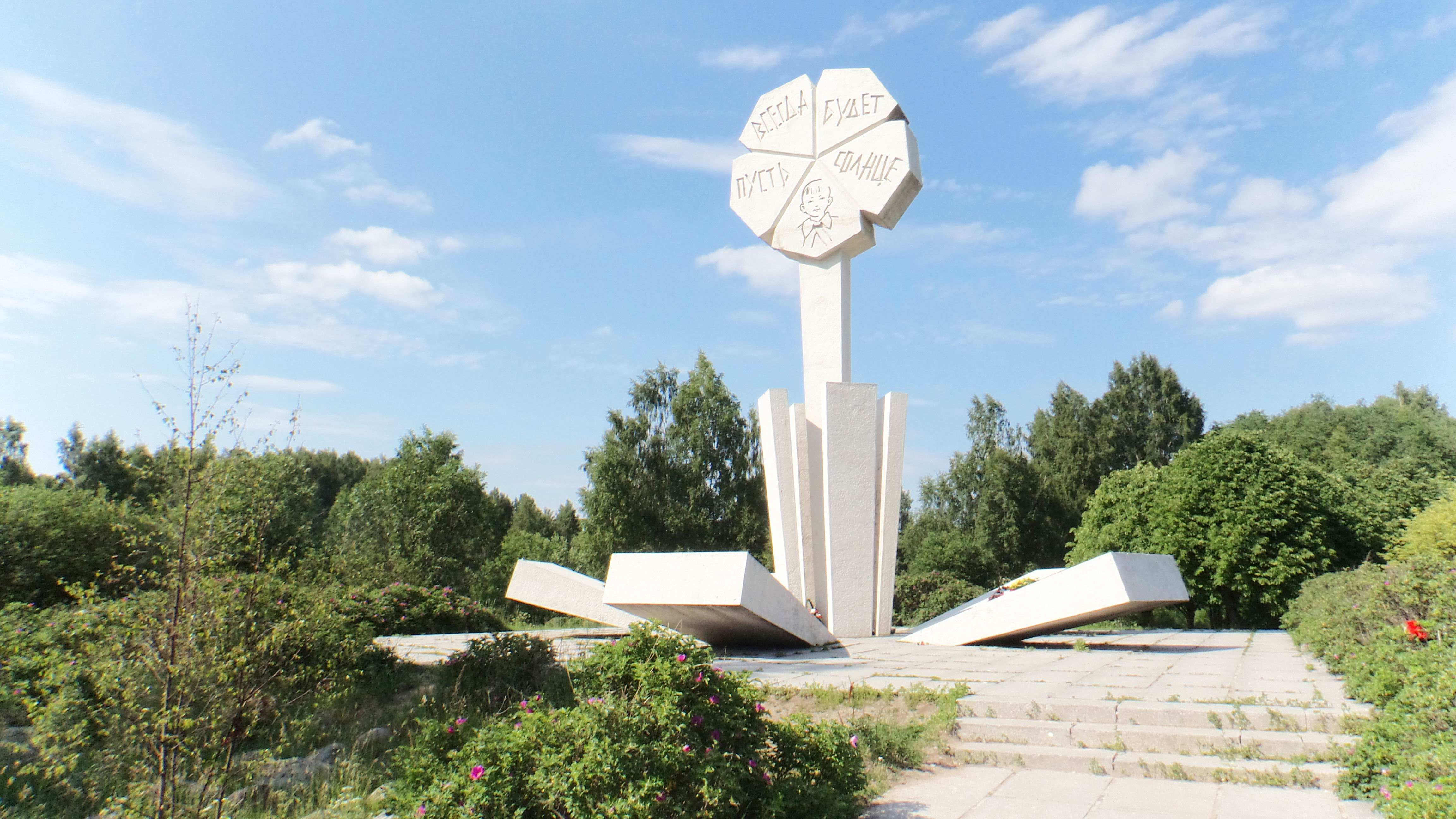 Мемориал в память обороны города в 1941-1944 гг. 'Зеленый пояс Славы Ленинграда' — памятник ленинградским детям 'Цветок жизни': 3 км "Дороги жизни", близ Ковалево, Всеволожский район, Ленинградская область. Архитекторы А. Д. Левенков и Г. Г. Фетисов, инженер М. В. Коман.